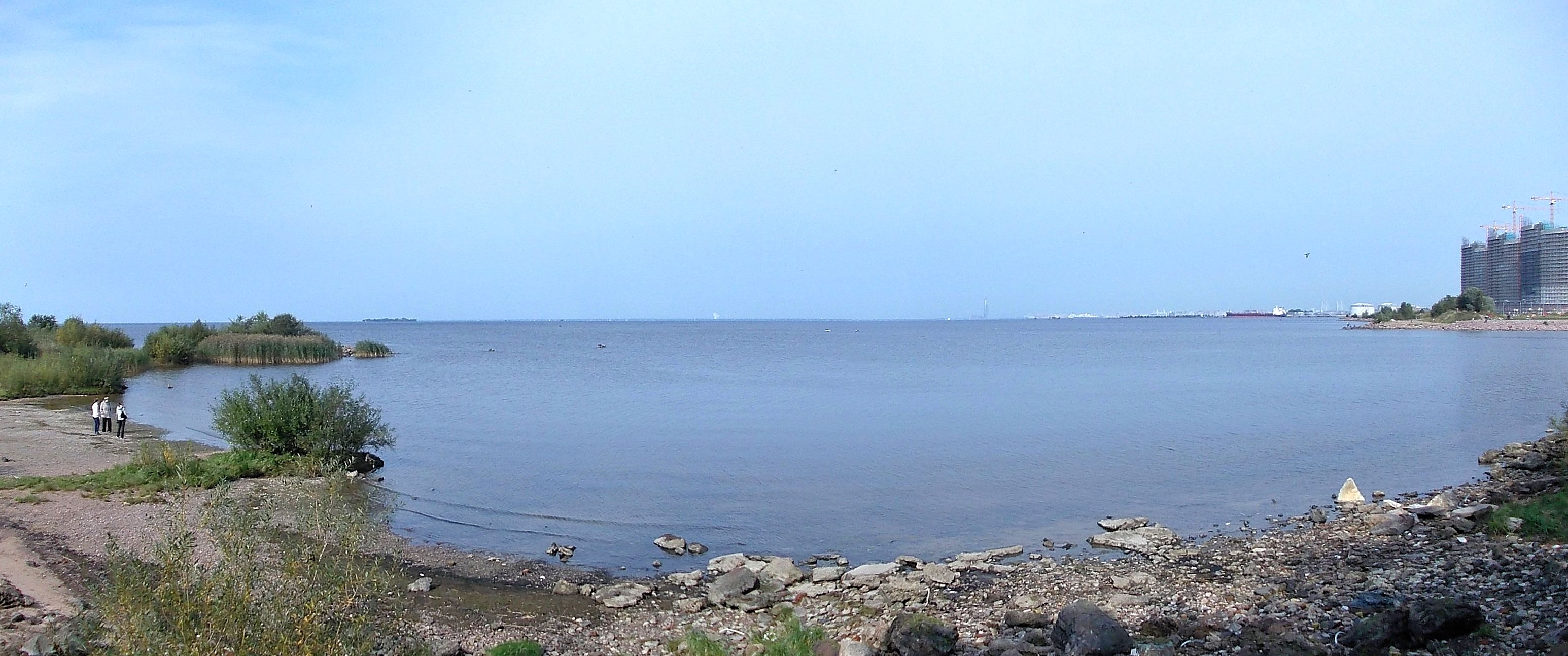 Устье Дудергофского канала